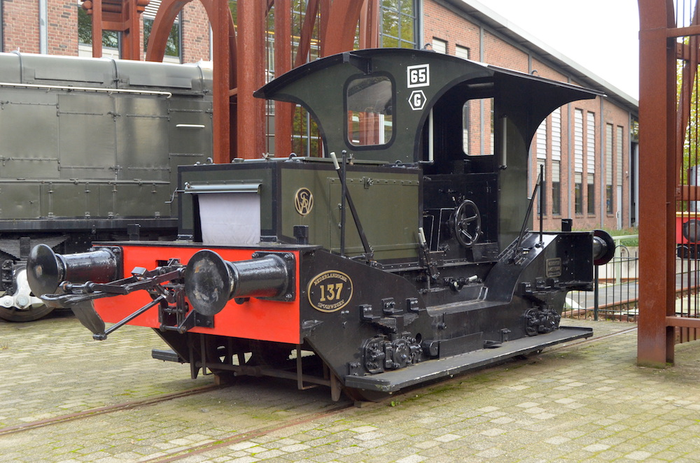 Nederlands Spoorwegmuseum locomotor NS 137. Foto: Erik Swierstra.